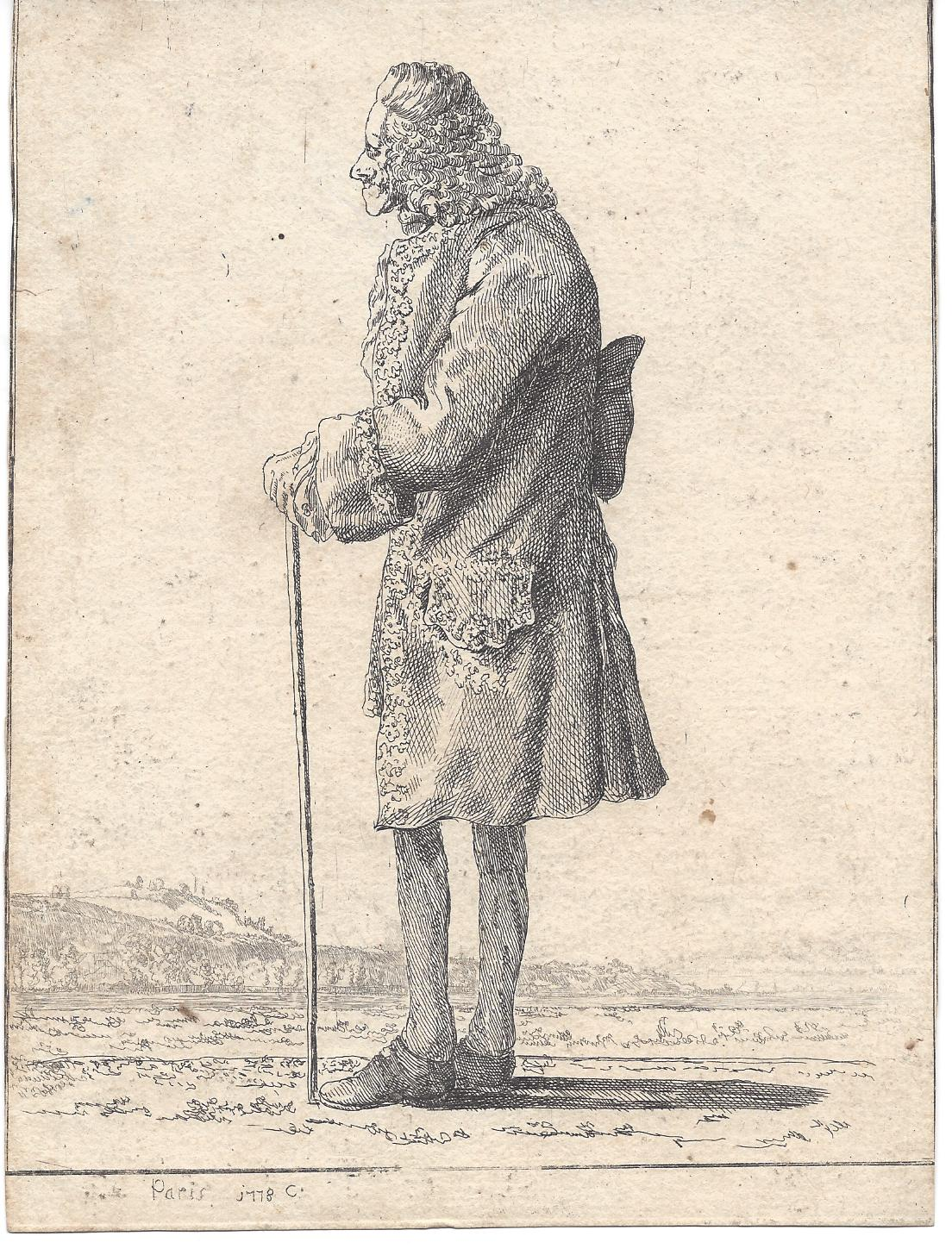 Jean Huber-Voltaire: Voltaire am Genfer See 1778 nach links blickend